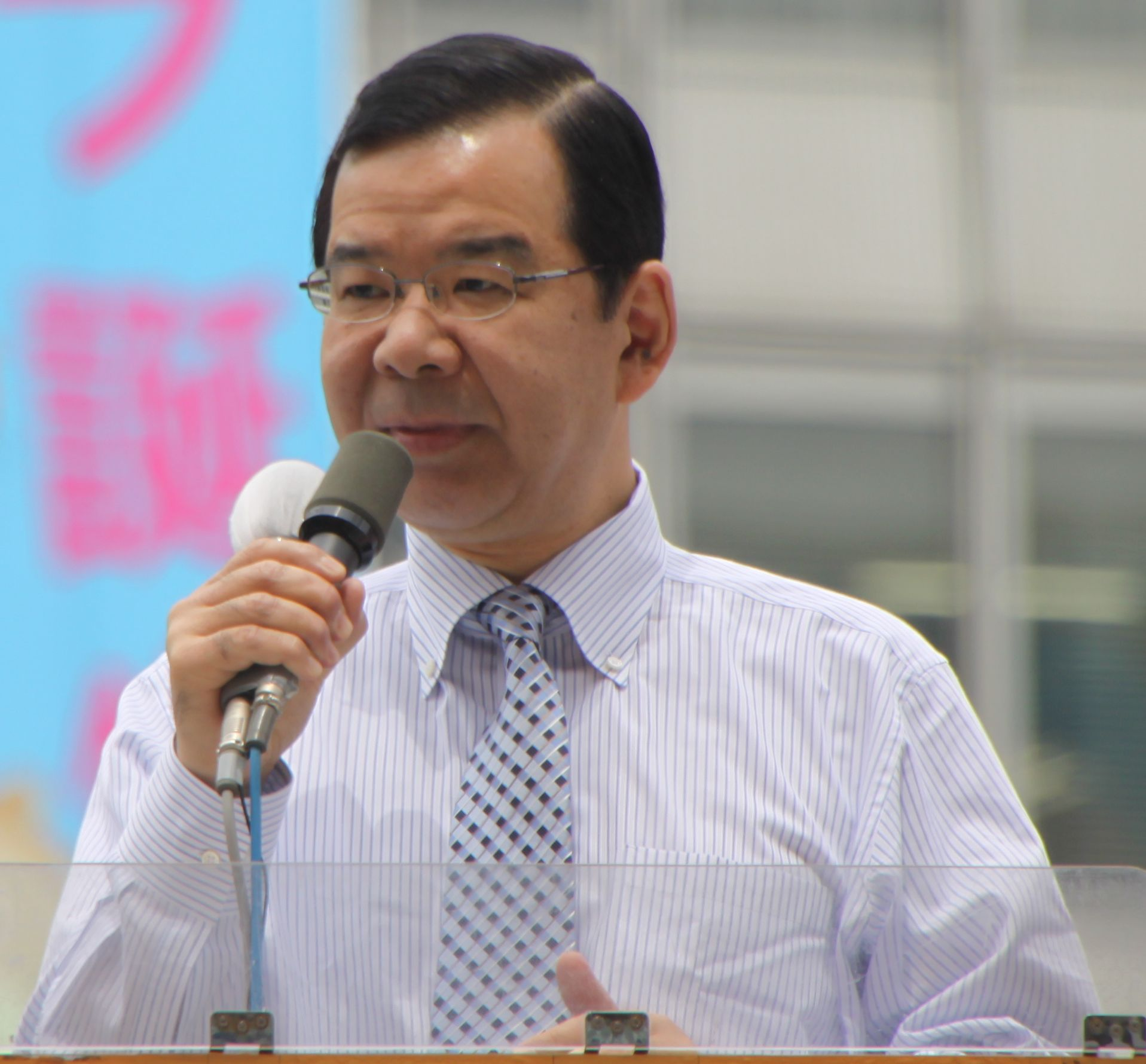 志位和夫2010年6月24日新宿駅西口にて